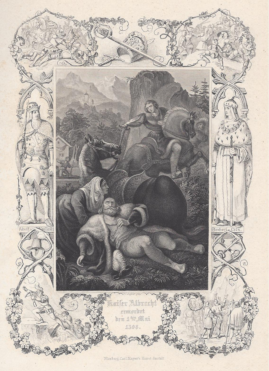 Kaiser (sic!) Albrecht ermordet dem 1. Mai 1308. Stahlstich von Carl Peter Geissler bei Carl Mayers Kunst-Anstalt in Nürnberg.